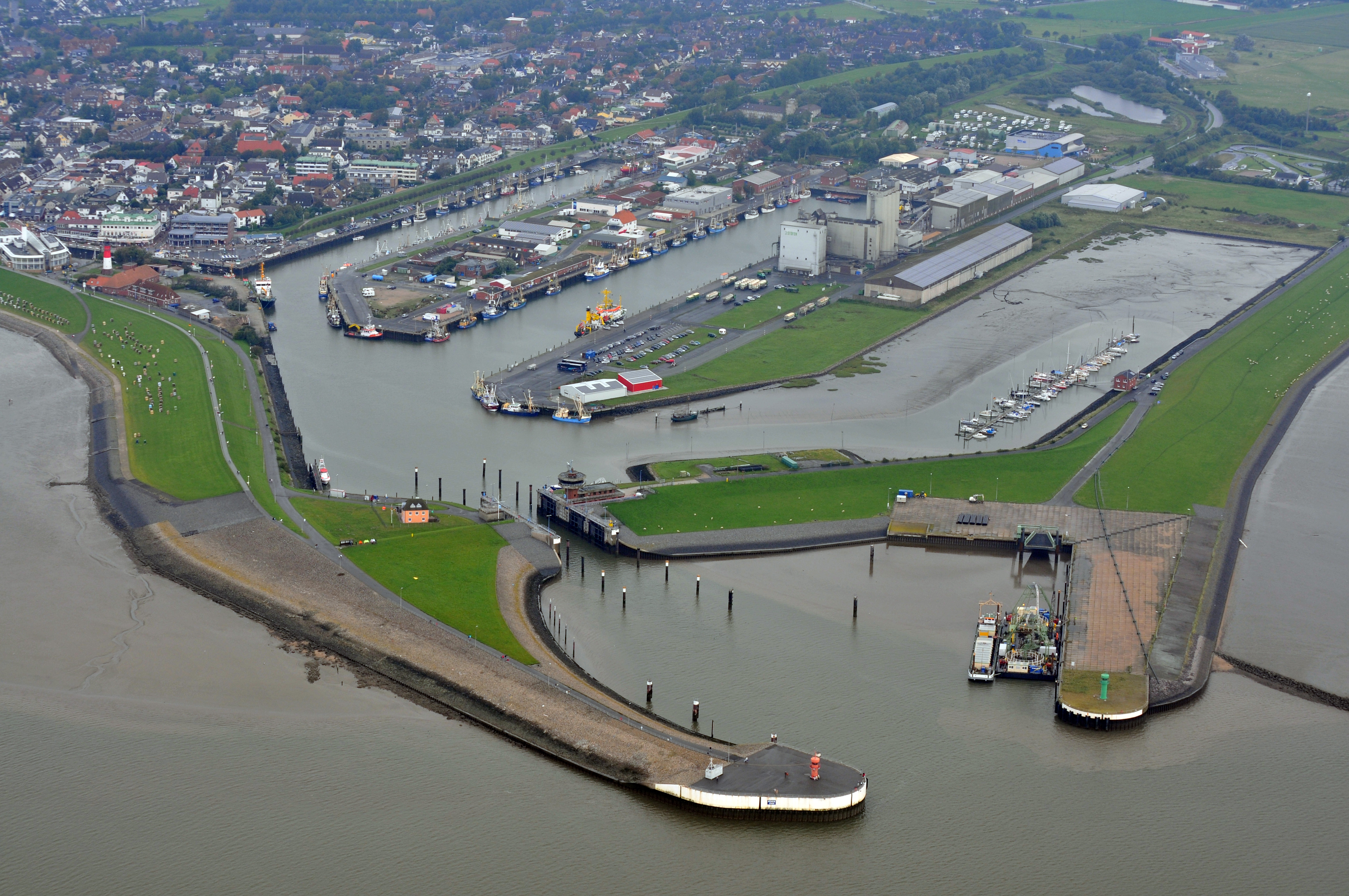 Fotoflug Nordsee Ansicht des Hafens von Büsum.